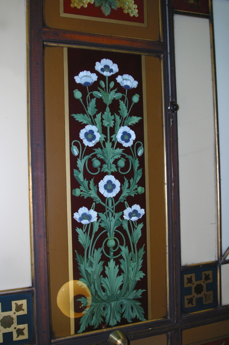 Papaver somniferum fra glassmaleri i Svaneapoteket i Oslo.